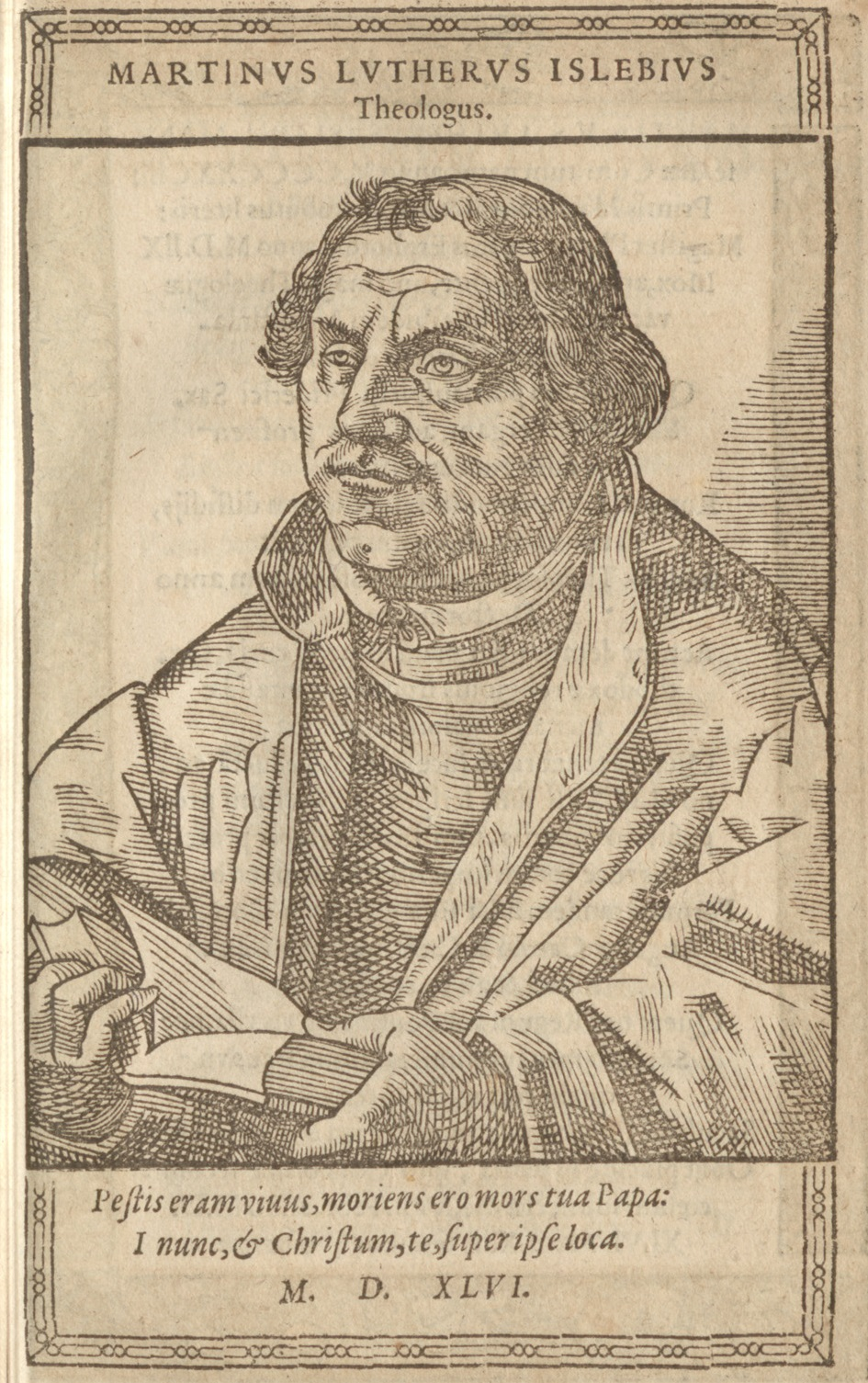 Holzschnitt-Porträt Martin Luthers mit der lateinischen Inschrift: "Lebend war ich dir eine Pest; sterbend werde ich dein Tod sein, Papst. Geh nun, und stelle selber Christus über dich." Jahreszahl 1546 (Todesjahr Luthers)